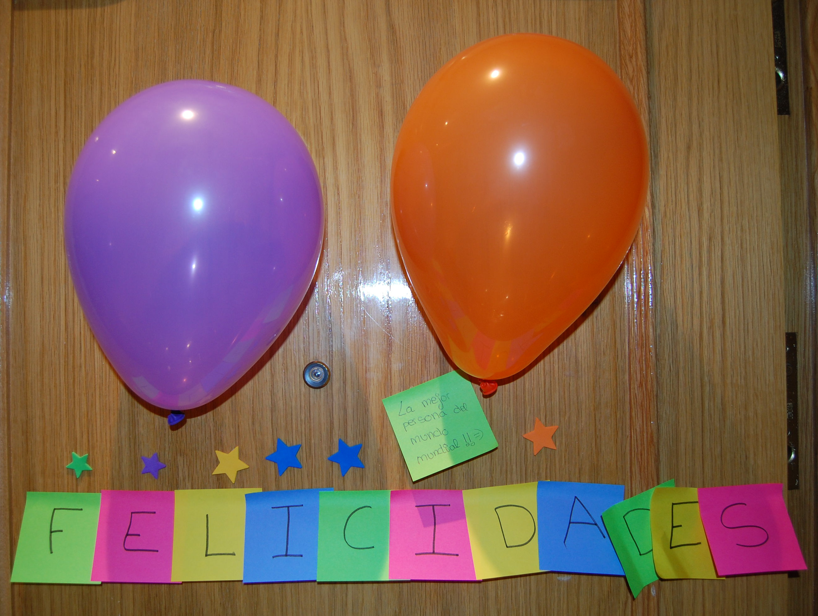 Felicitaciones con globos y pegatinas de colores.